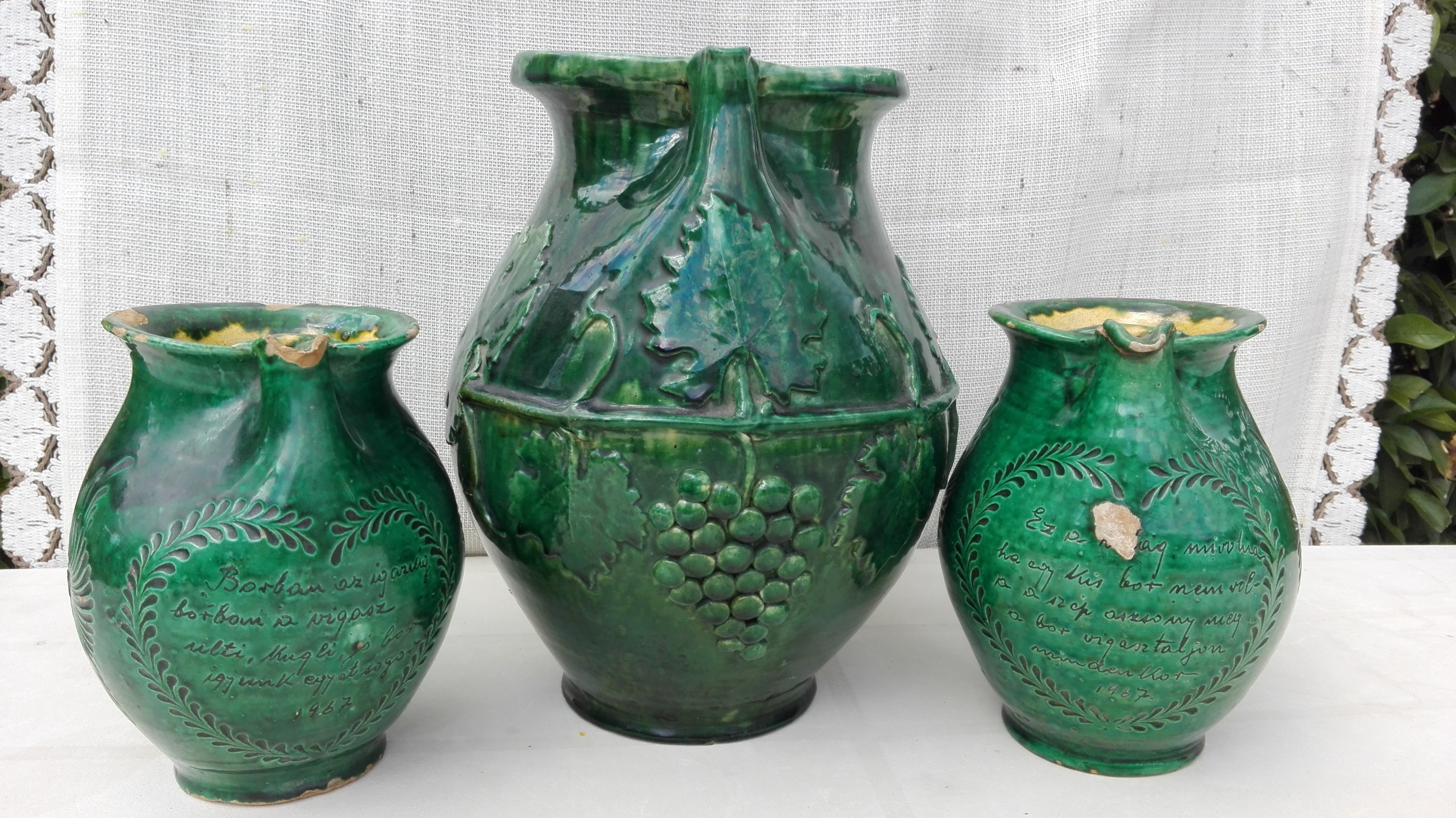 Boros korsók